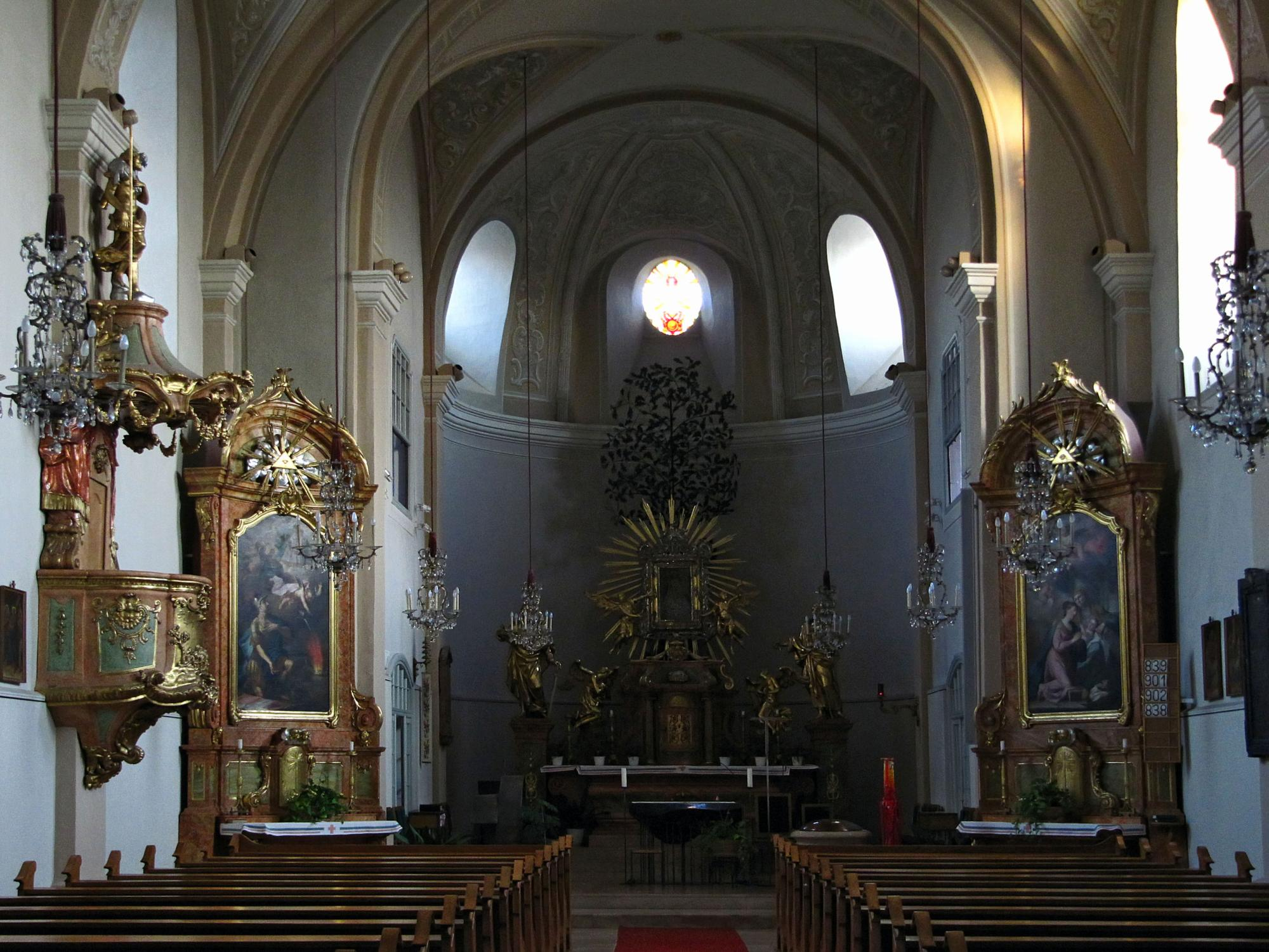 Kath. Pfarrkirche, hll. Peter u. Paul, Wallfahrtskirche Maria am Baum, Kaiserebersdorf.